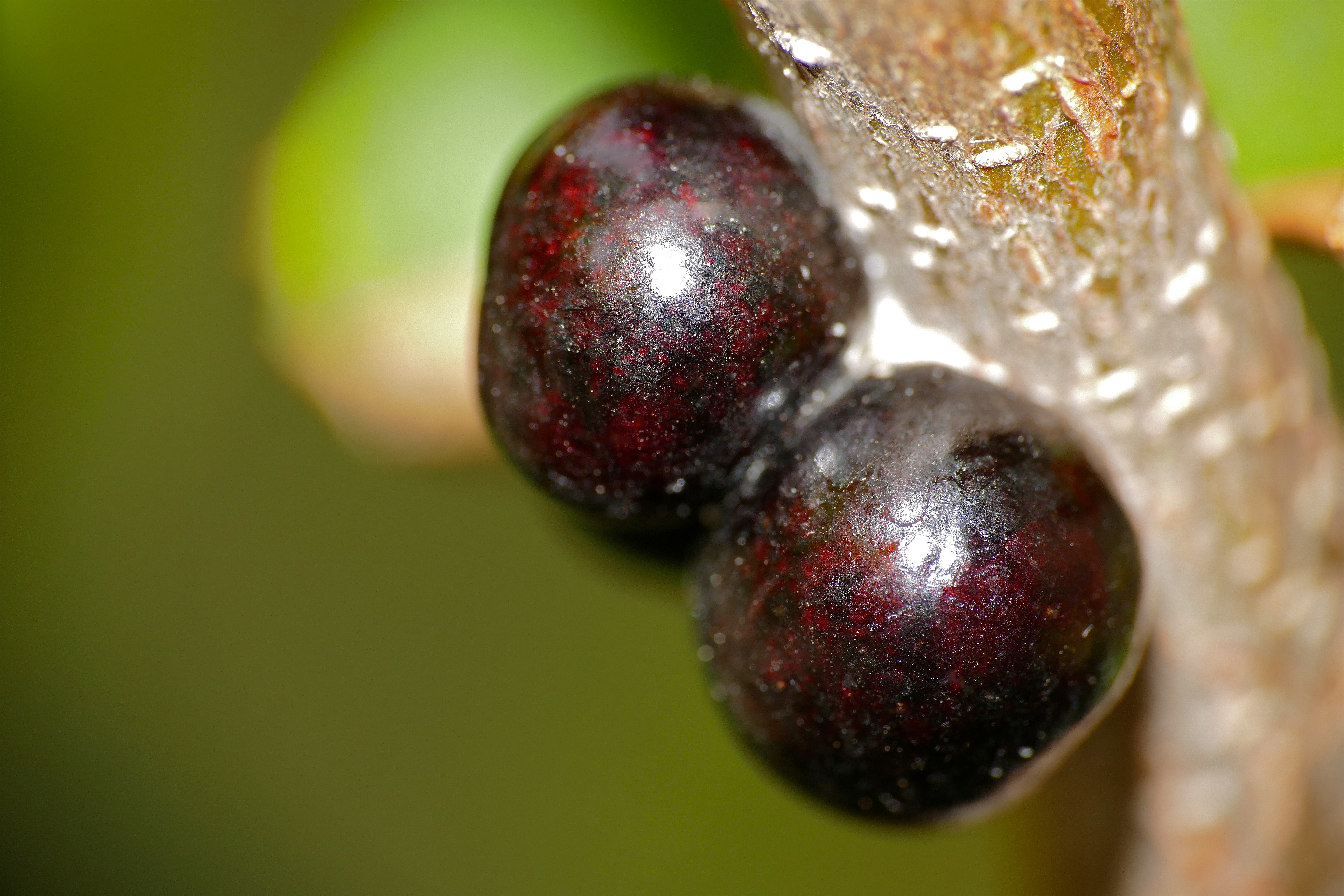 Gorges d'Héric, Mons-la-Trivalle, Hérault, FRANCE